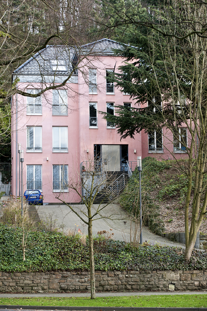 Corpshaus